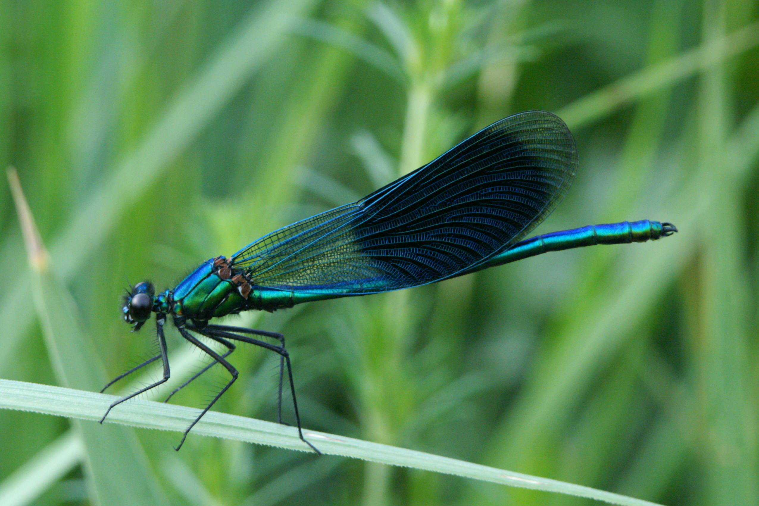 männliche Die Gebänderte Prachtlibelle (Calopteryx splendens) ist eine Libellenart aus der Familie der Prachtlibellen (Calopterygidae), welche sich wiederum in der Ordnung der Kleinlibellen (Zygoptera) befindet.